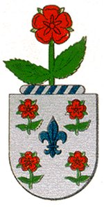 Escudo do Brasão da família Baldaia, Portugal.